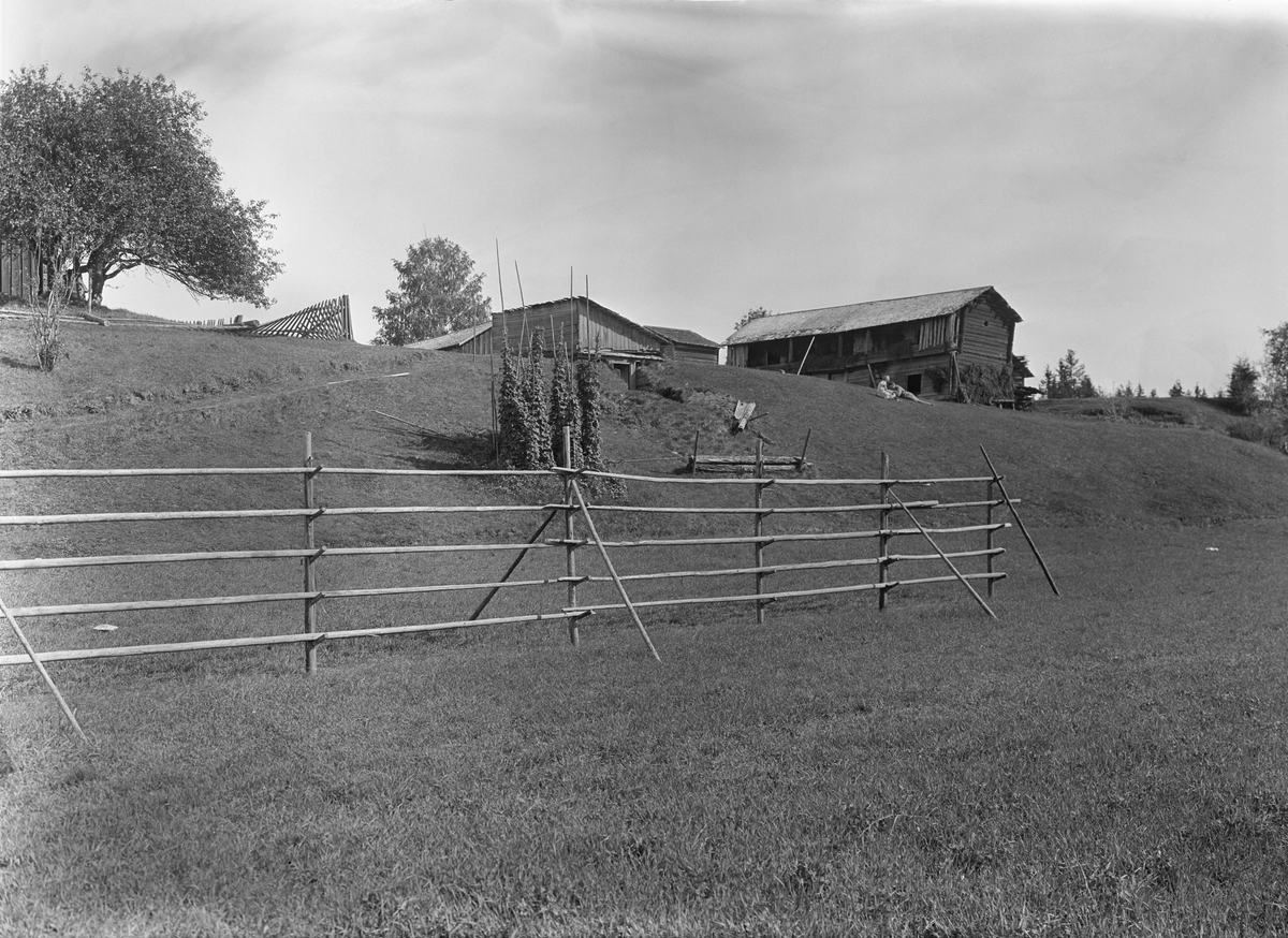 Värmland. Älvdals hd. N. Ny sn. Nedre Värnäs. Janngården. Hässja och humlegård. Foto G. Berg 1928. Etnologiska undersökningarna NORDISKA MUSEET 1001. Sp. 98 Pors och humle för brygd.